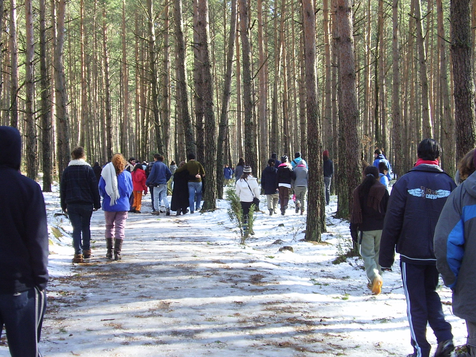 חניכים מתנועת הנוער העובד והלומד ביער לופוחובה רישיון נוצר על ידי משתמש:אור גואטה